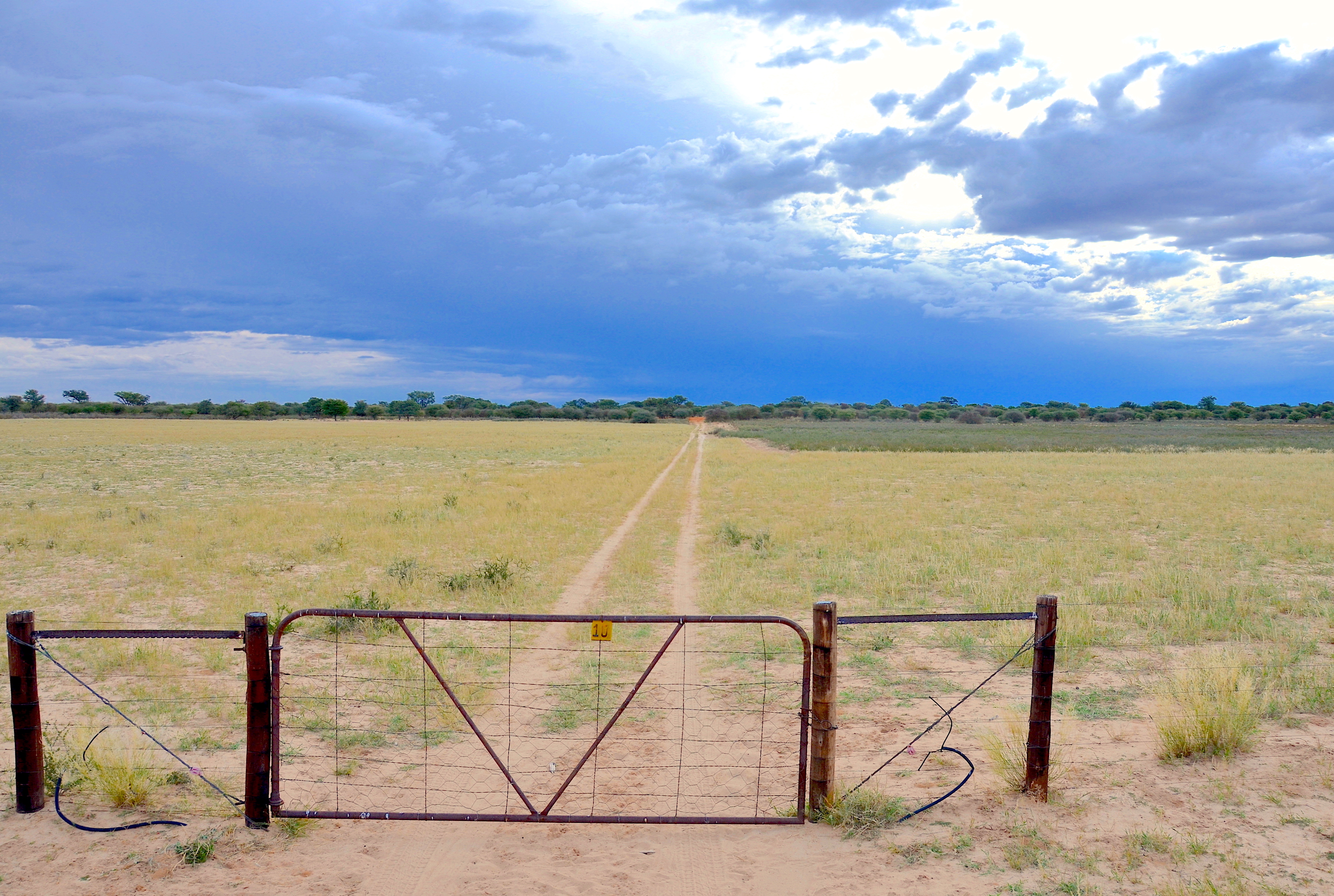 Farmtor und Farmpad in Namibia